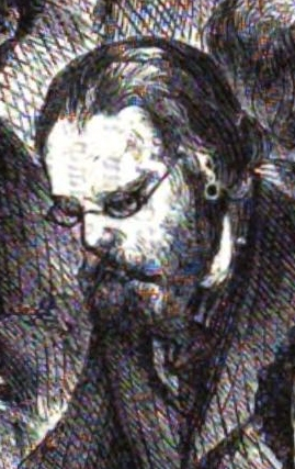 Gustav Feckert, deutscher Maler im 19. Jh.